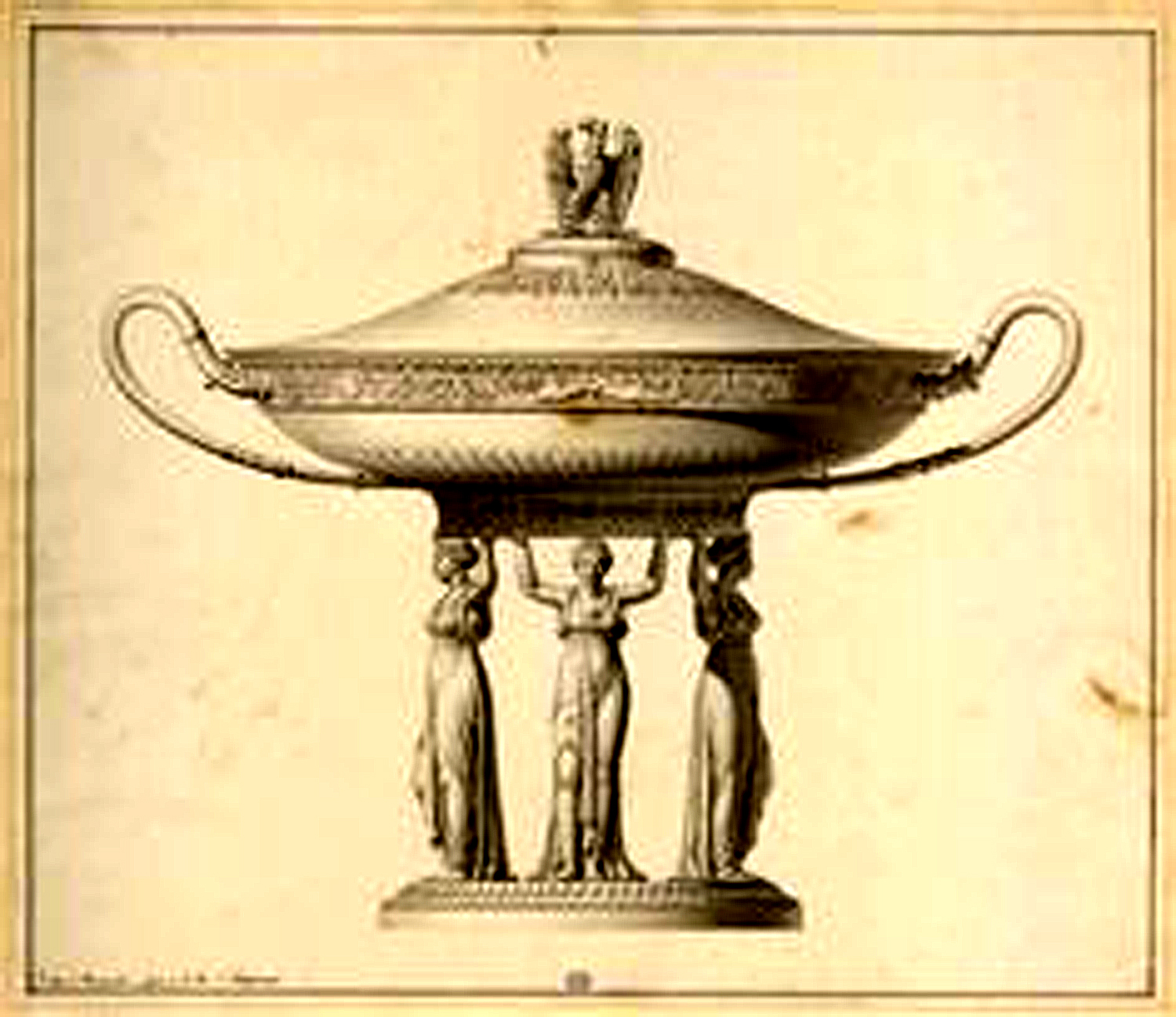 Pot à oille gravure du 1er empire